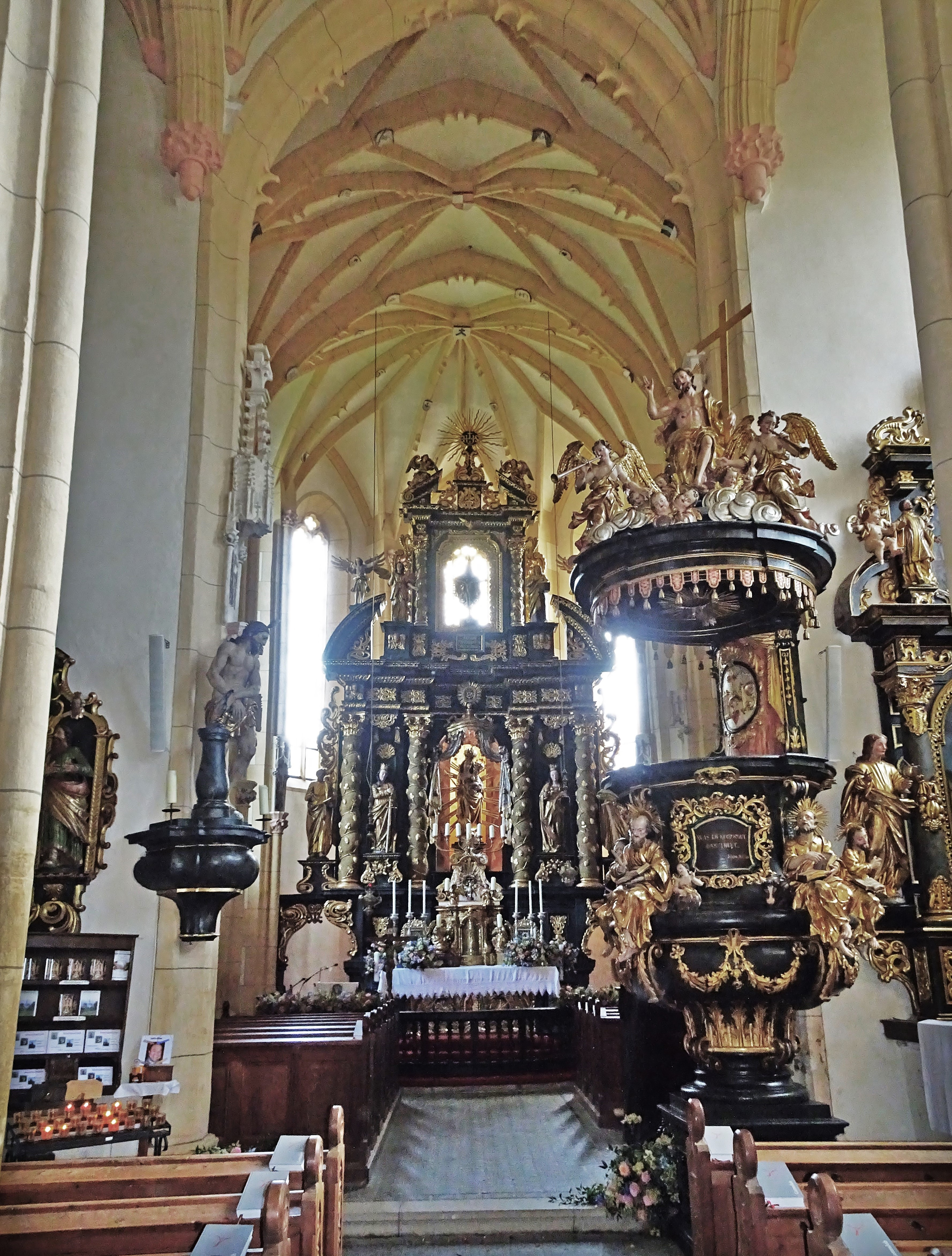 Wallfahrtskirche Unsere Liebe Frau Hochfeistritz, Innenansicht